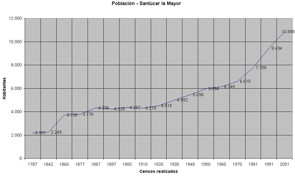 Gráfico evolución histórica de los habitantes en Sanlúcar la Mayor en Sevilla.